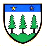 Wappen von Icogne Kanton Wallis Schweiz